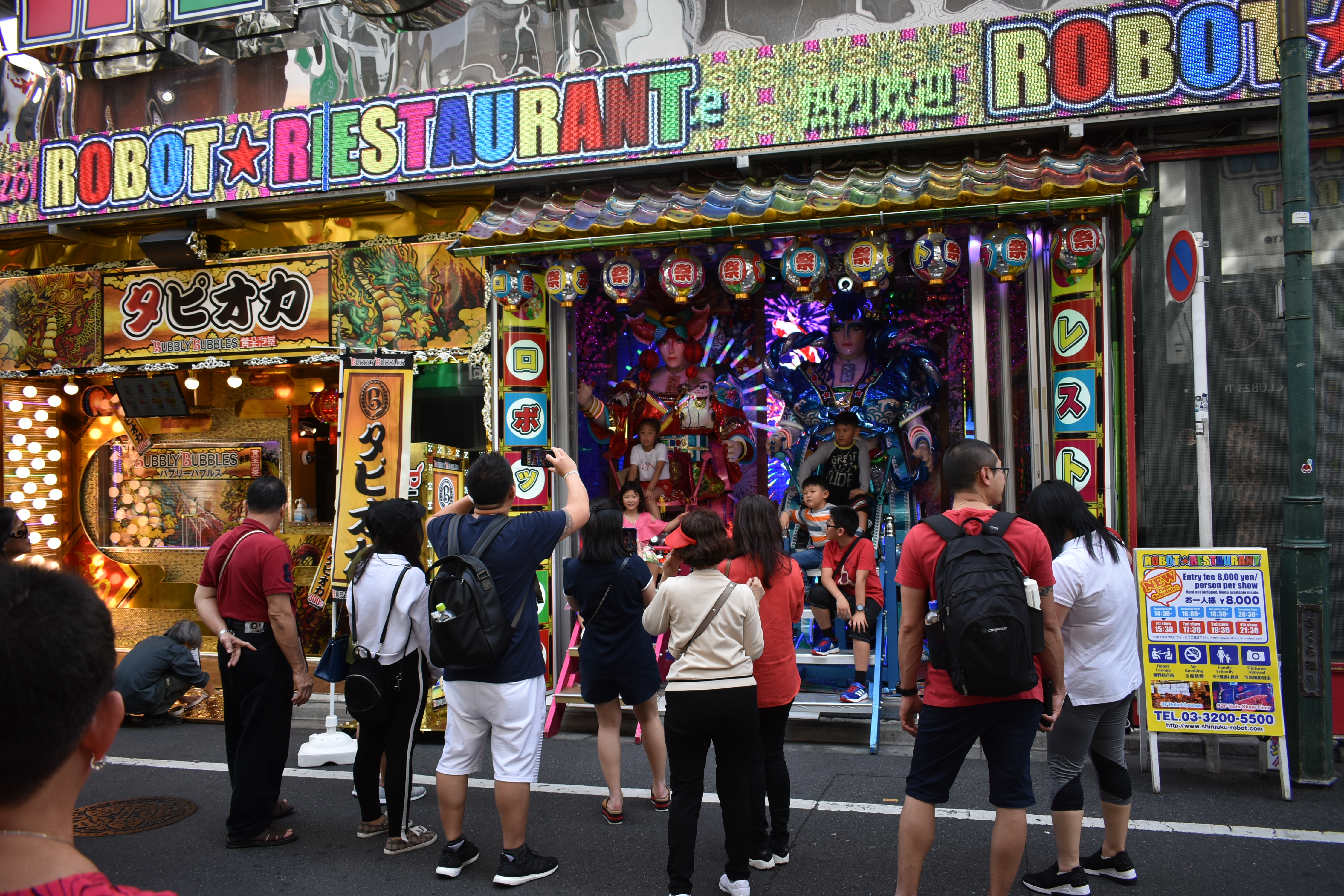 ロボットレストラン Nikon D3400